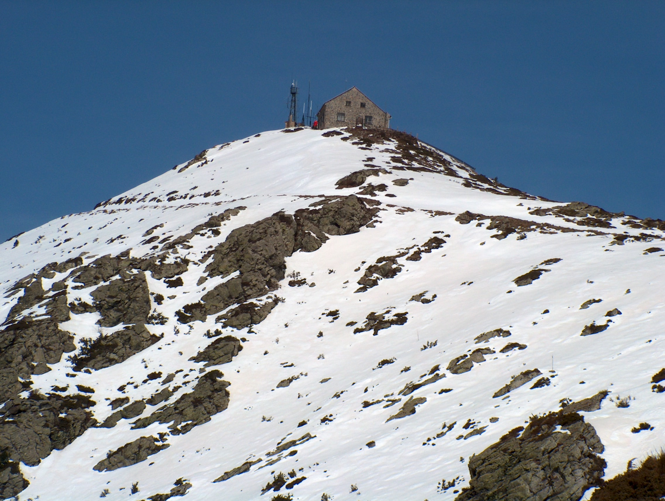 Turó de l'Home (Montseny) This is a a photo of an emblematic summit in Catalonia, Spain, with id: CE-295107006